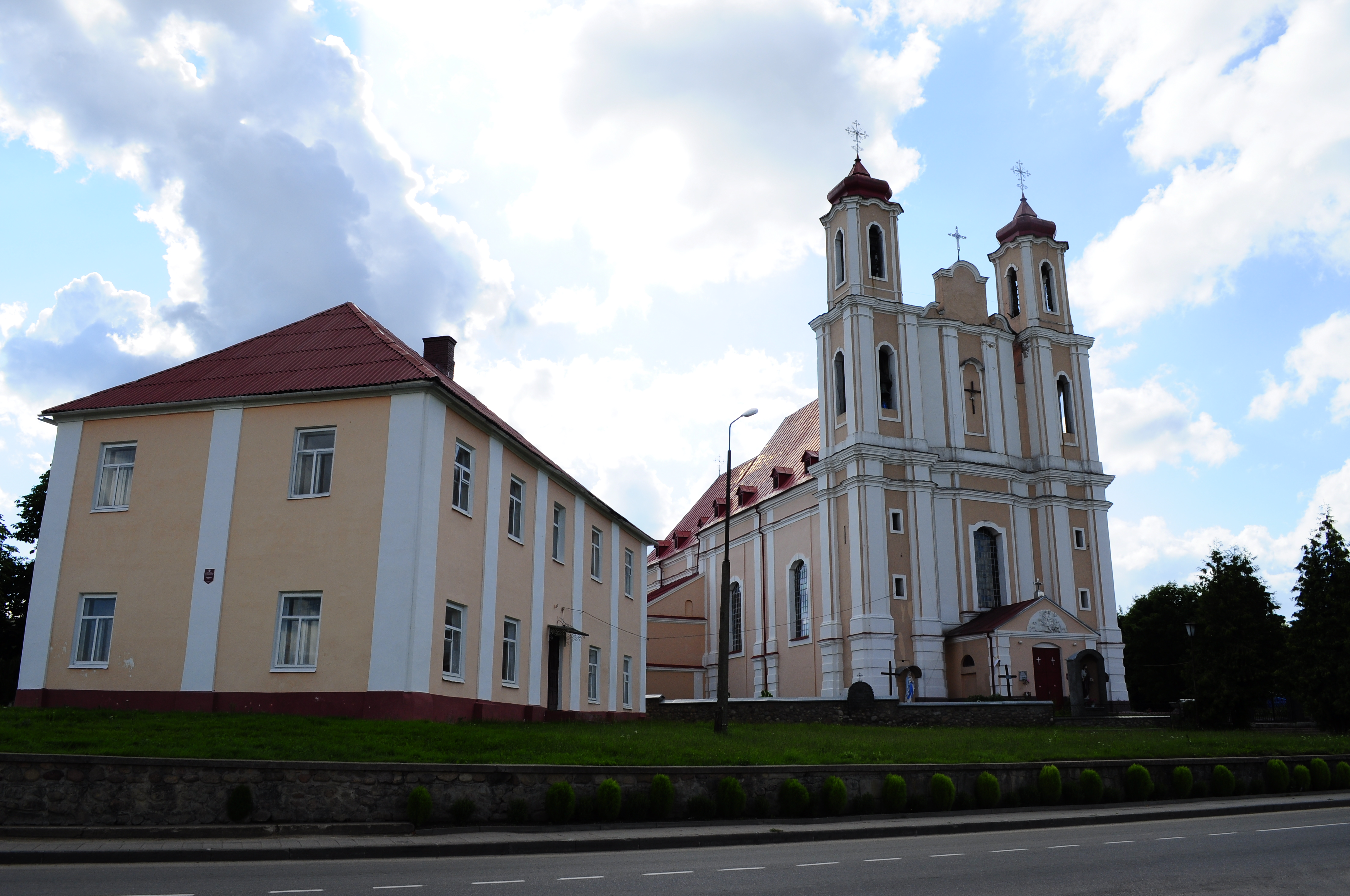 Беларуская (тарашкевіца): Варняны. касьцёл Сьв. Юрыя This is a photo of Belarusian heritage monument. Reference number: 412Г000038 ( WLM)